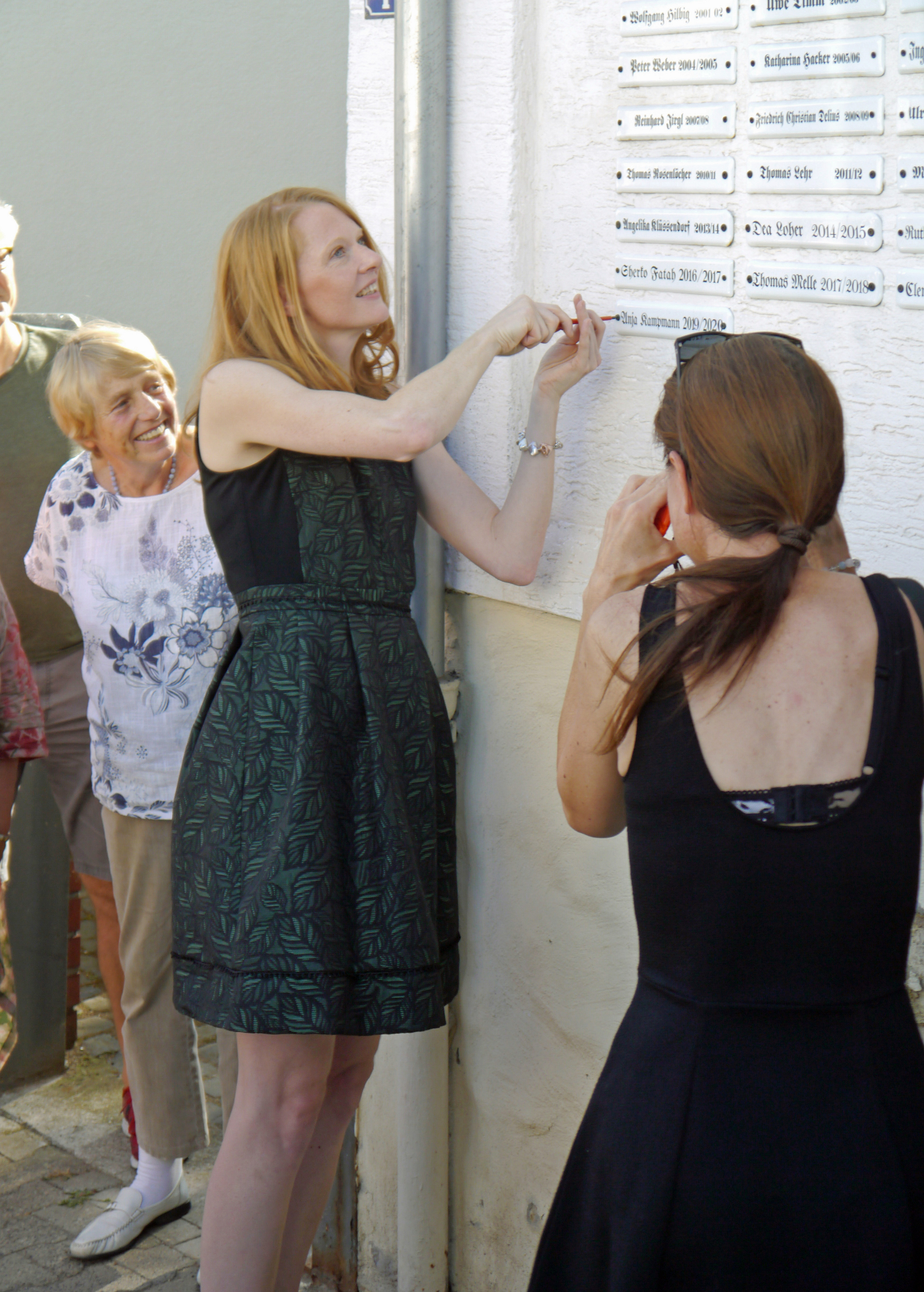 Anja Kampmann, am 31. August 2019, beim Anschrauben ihres Namensschildes am Stadtschreiberhaus in Bergen.